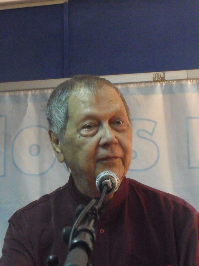 Monsieur Paul Vergès lors d'un meeting sur le Tampon dans le cadre des élections régionales du 21 mars 2010.